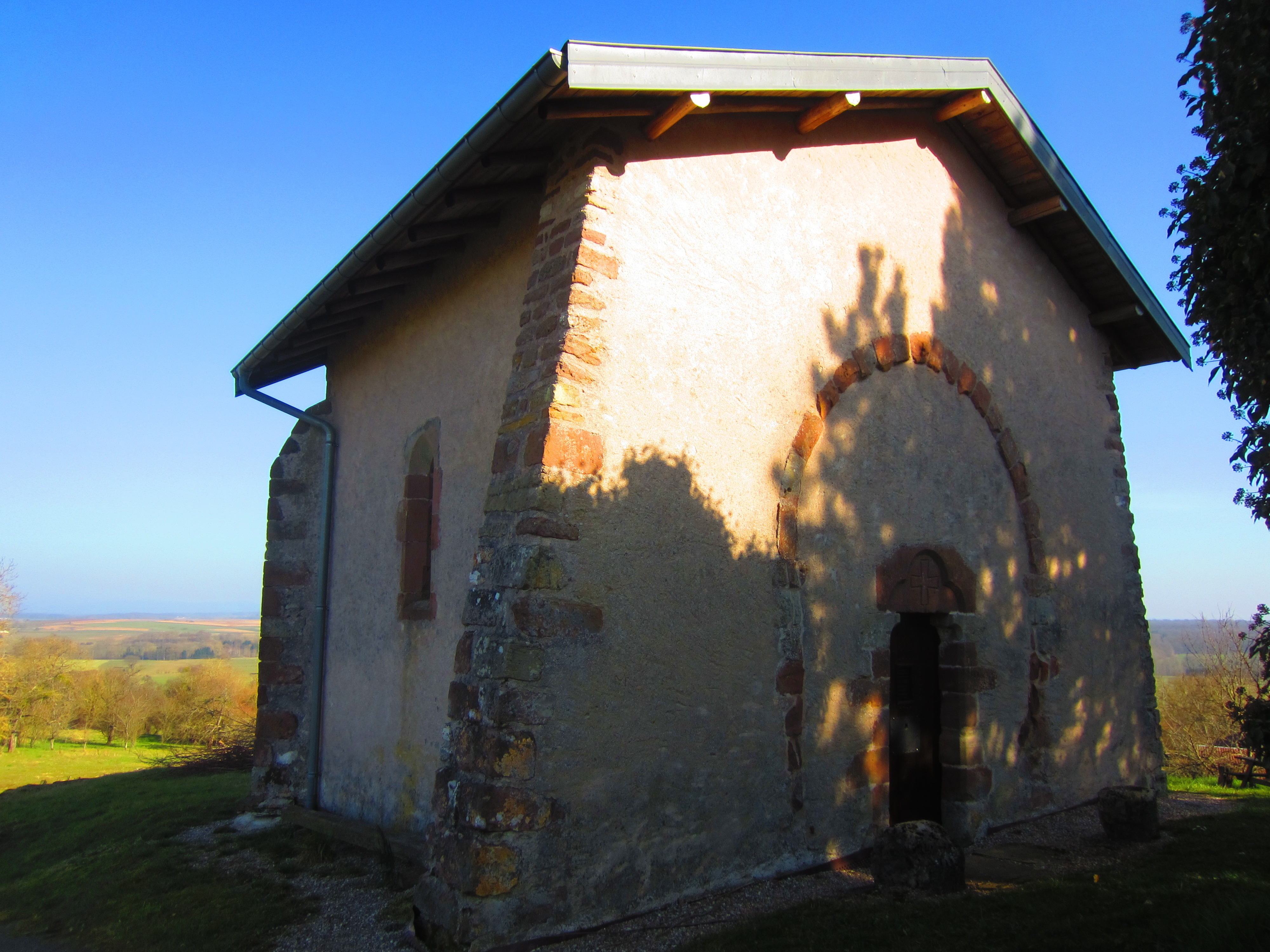 Fontenoy la Joute chapelle (7) .